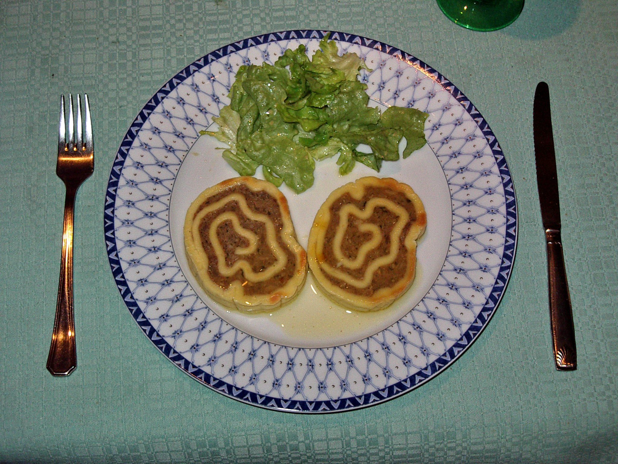 Fleischnacka, a elsassische Spezialität !